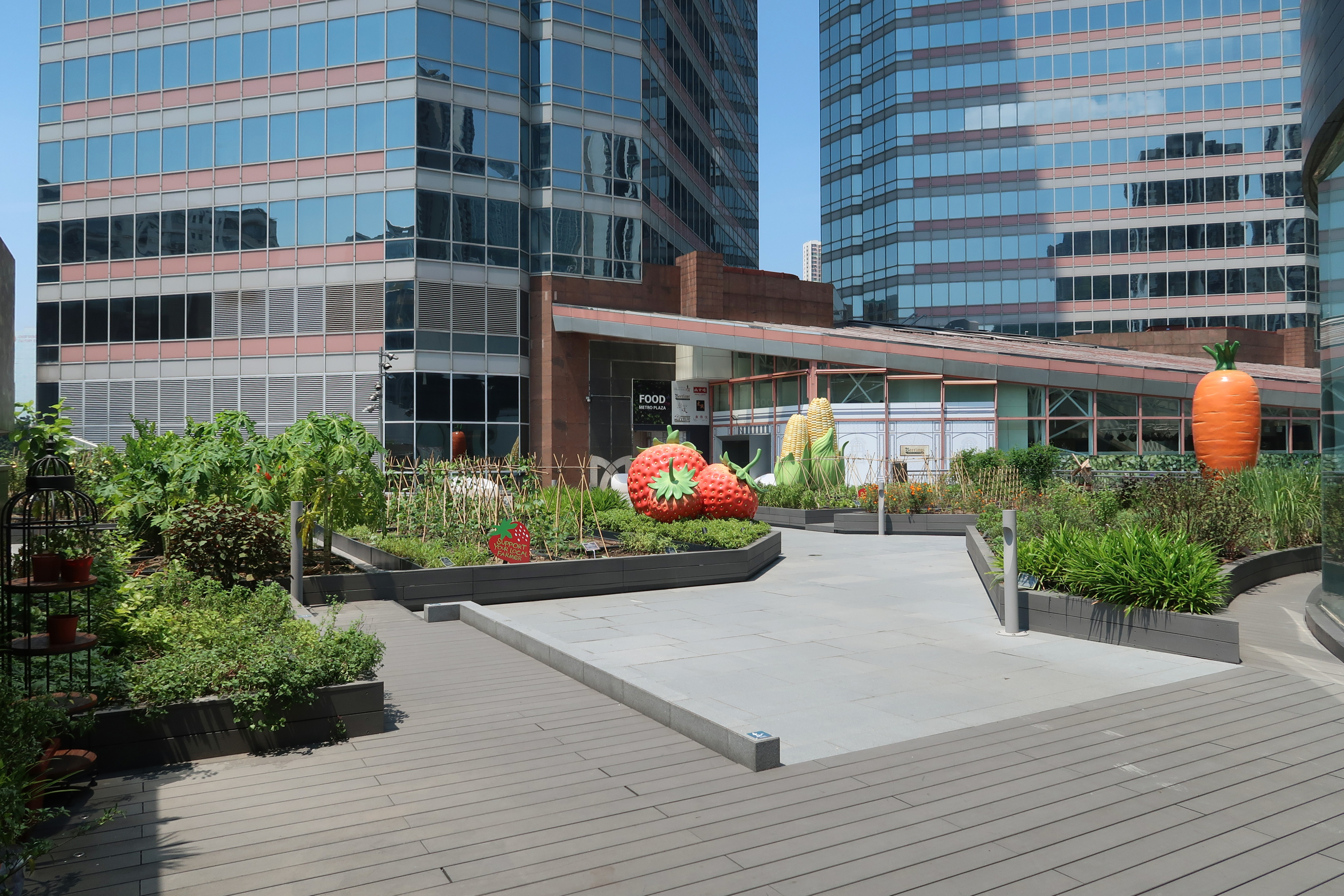 Metroplaza L5 Urban Farm